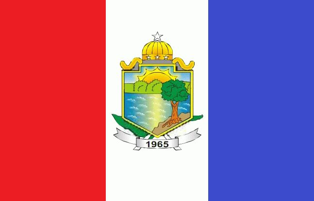 Bandeira da Cidade de Coari-Amazonas